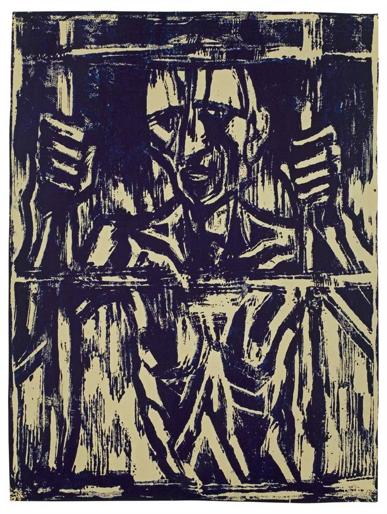 Der Gefangene. Holzschnitt in Blau auf festem Papier. 62 x 46,5 cm